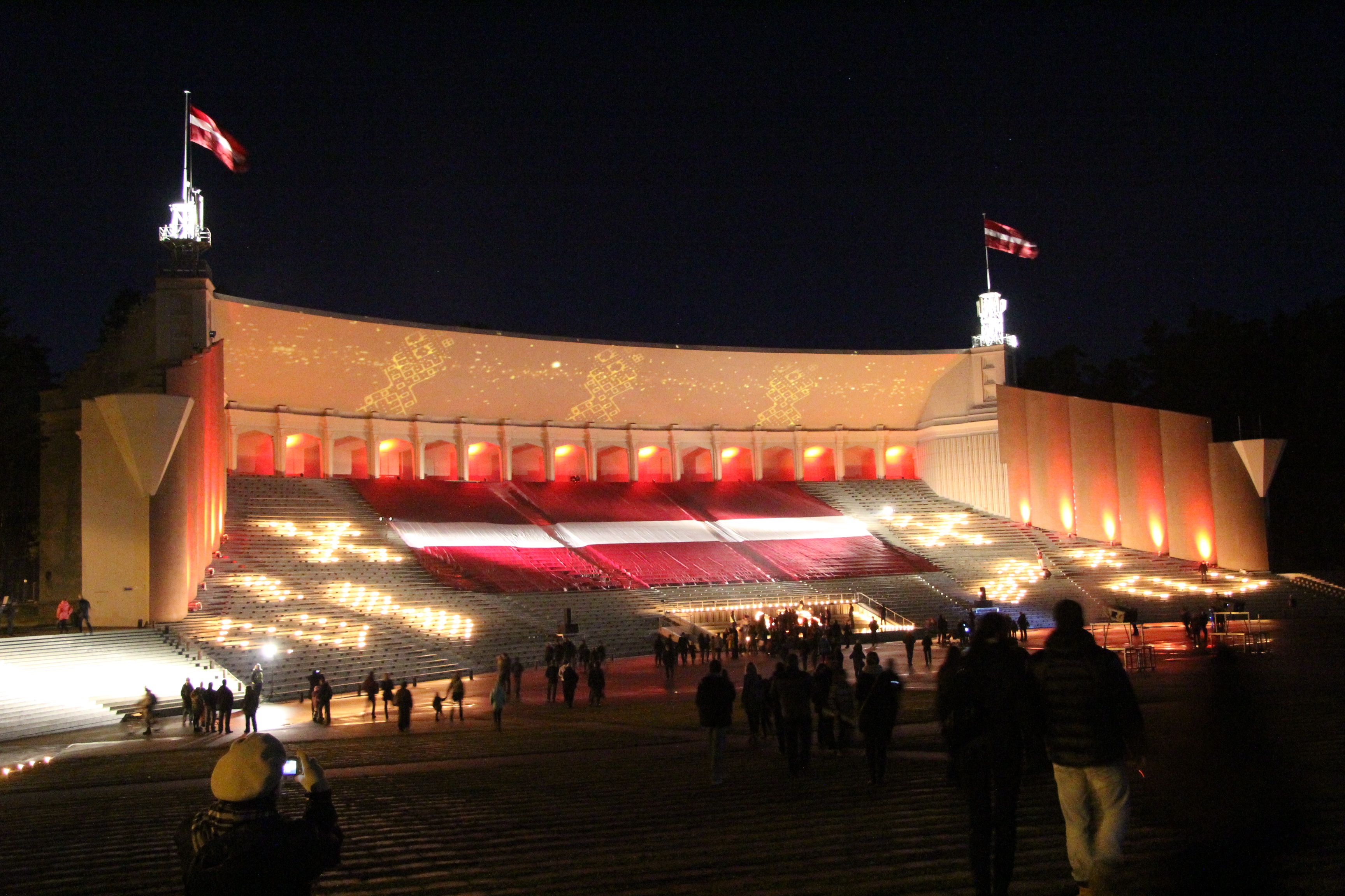 Dziesmu svētku estrāde 18 novembra naktī